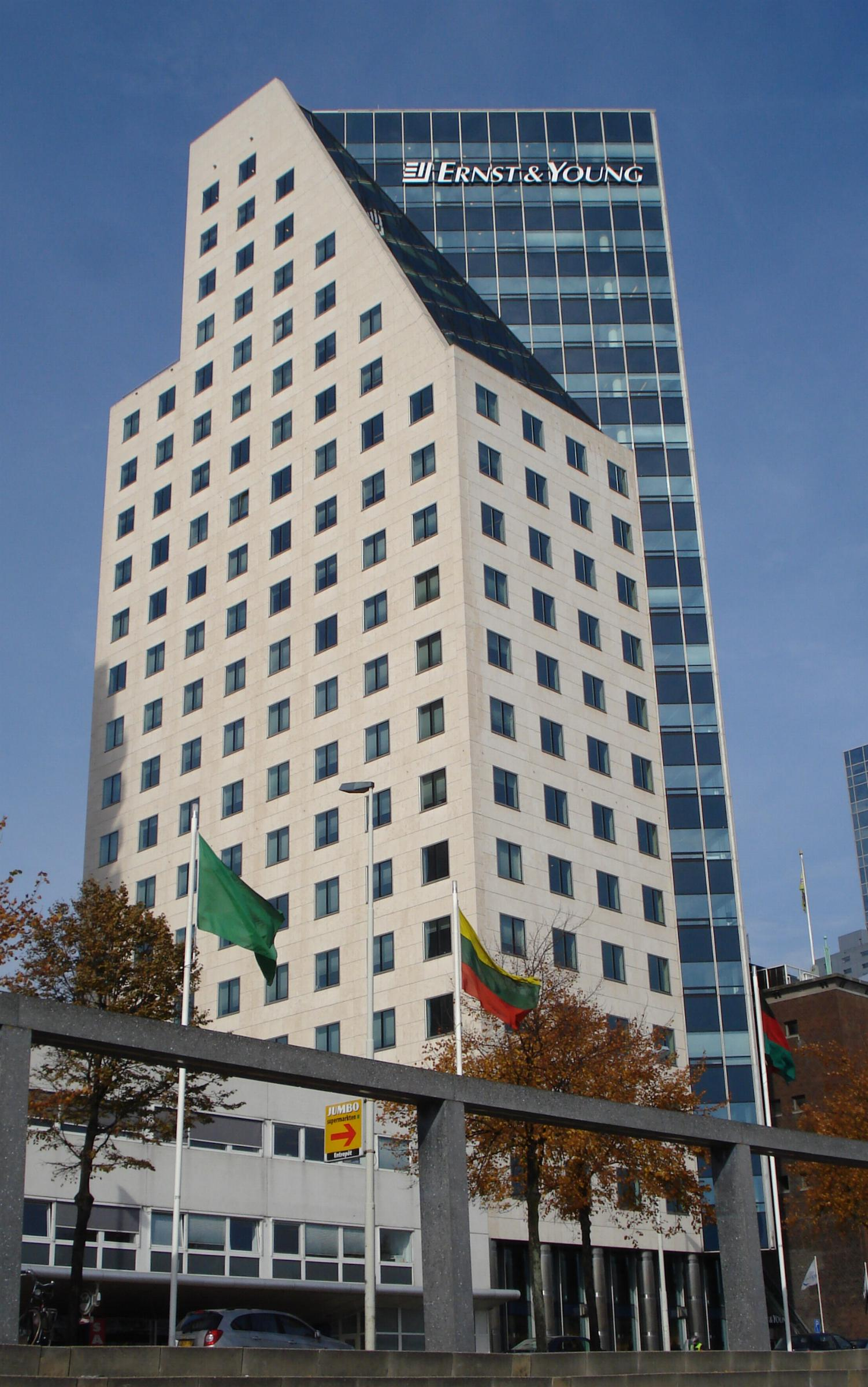 Rotterdam, Boompjes, Gebouw Ernst & Young.